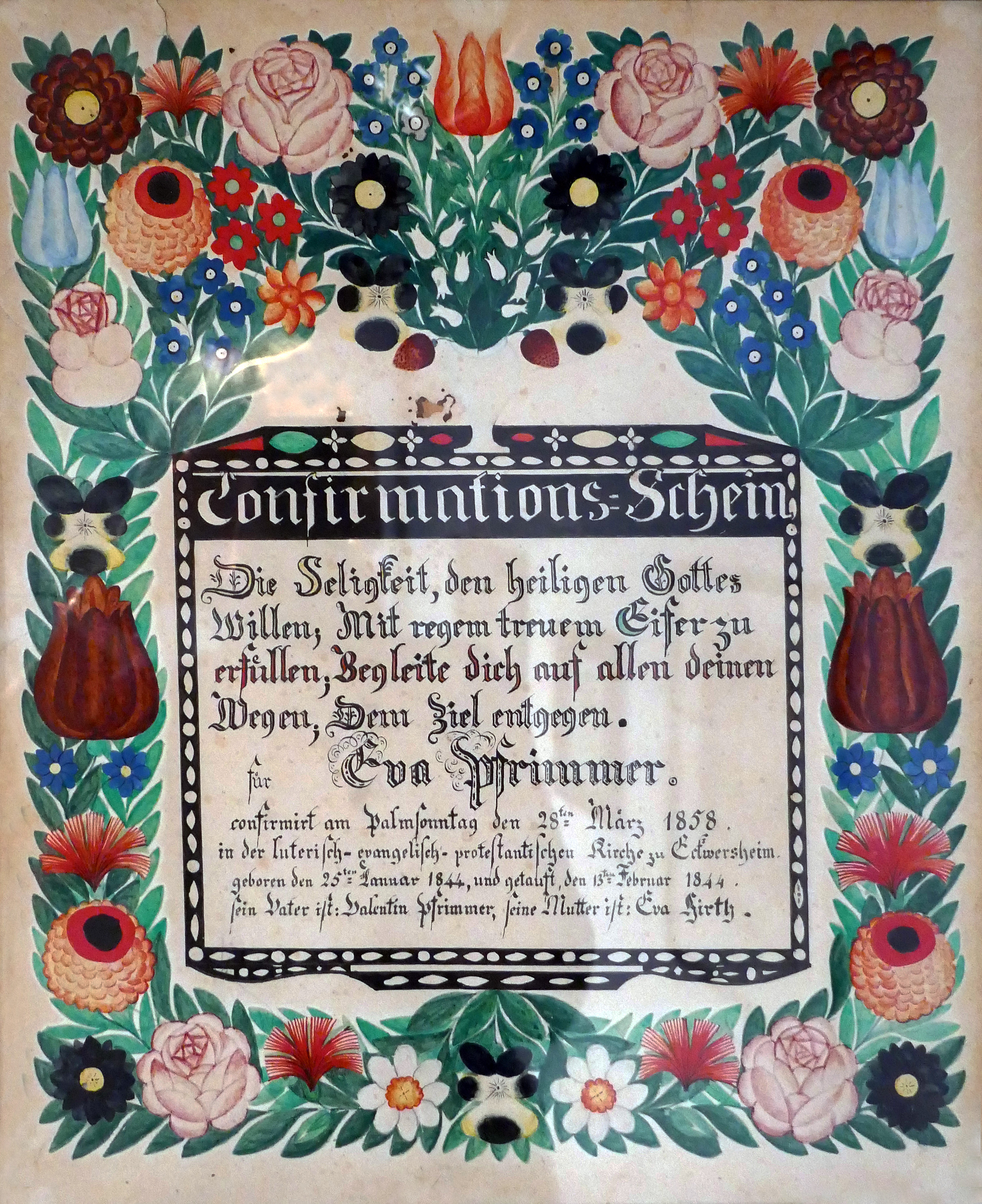 Texte manuscrit et peint pour la confirmation d'Eva Pfrimmer, Eckwersheim, 1858. Exposition Vies protestantes : le mot et l'image au Musée alsacien de Strasbourg (2017).